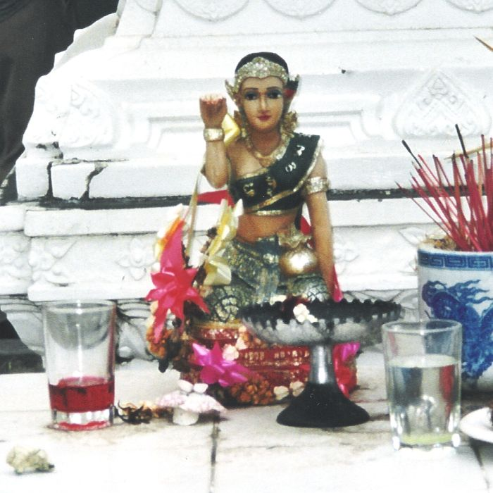 Nang Gwak (นางกวัก) at Cha Am, Thailand